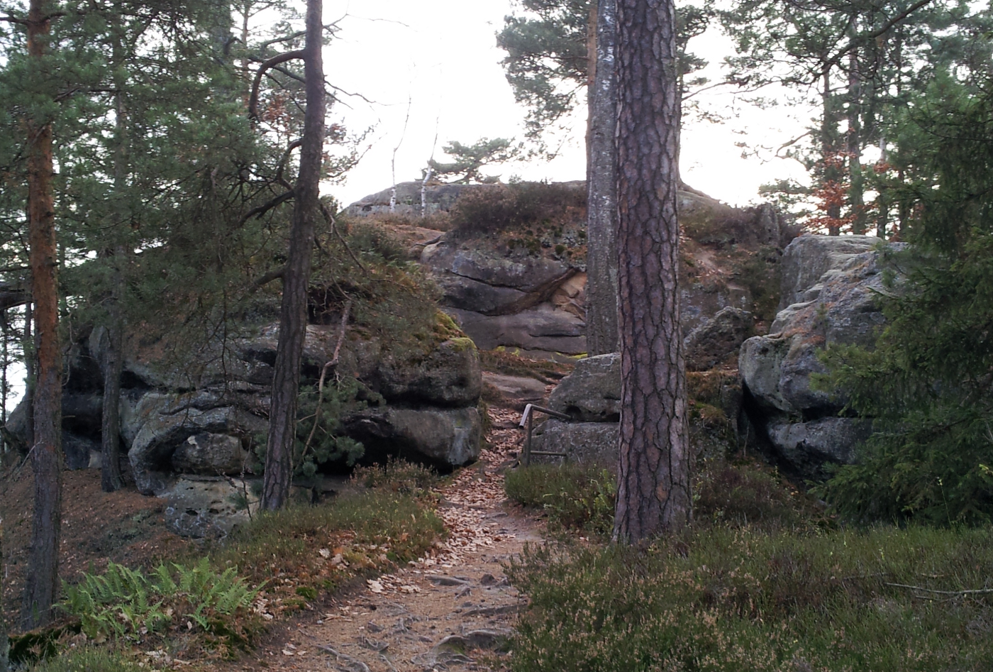 Burg Arnstein (Sachsen) – Gipfelplateau der ehemaligen Burganlage